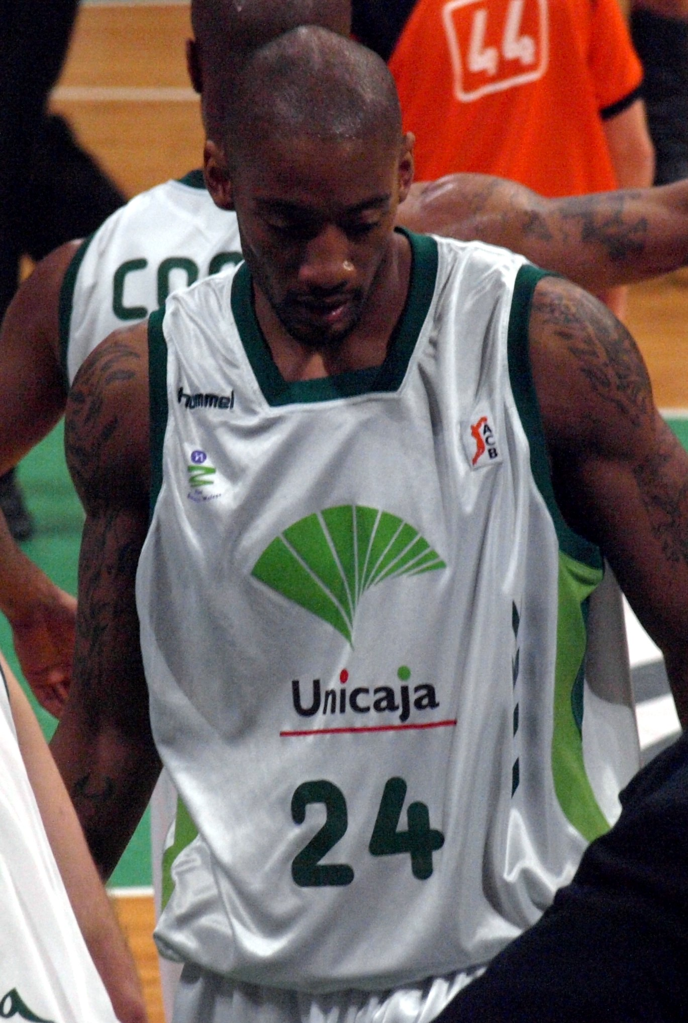 Marcus Haislip en el partido que enfrentó al al Unicaja Málaga y al DKV Joventut de liga ACB en el Olímpico de Badalona en febrero de 2009.